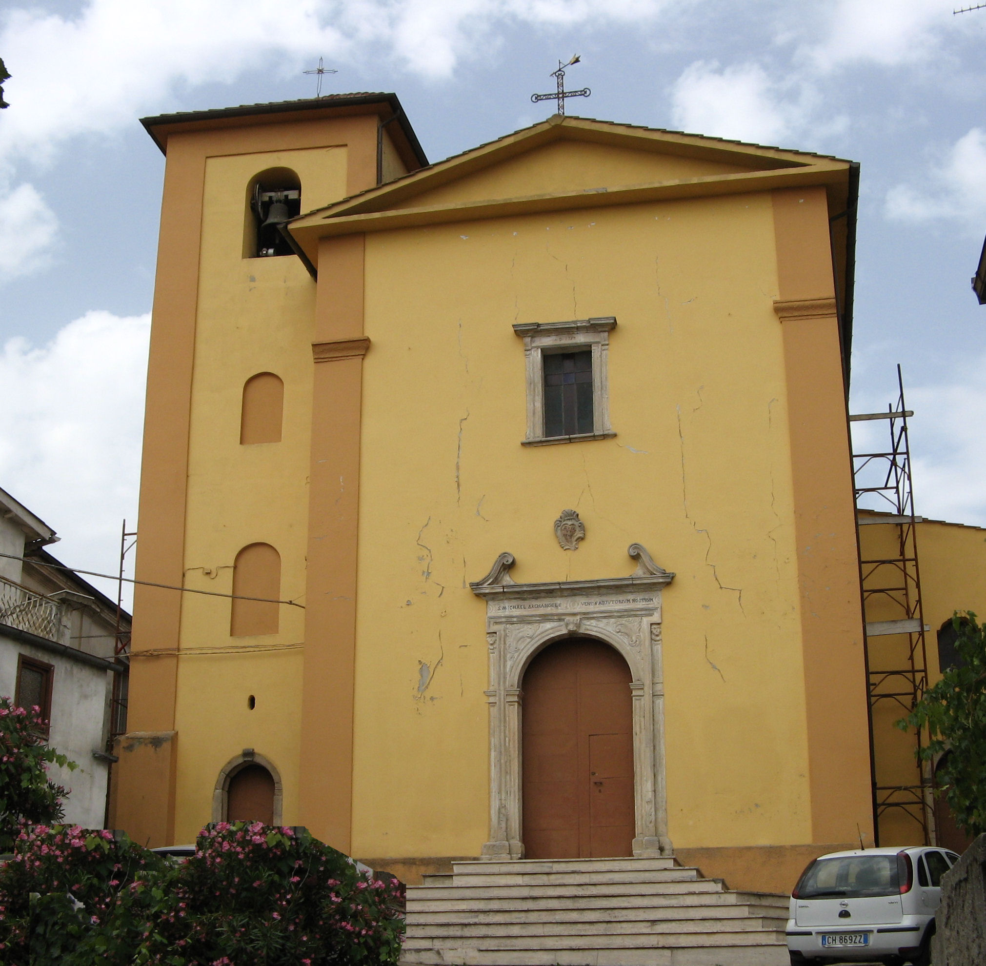 San Tommaso, frazione di Soveria Mannelli: Chiesa Parrocchiale dedicata a San Michele.